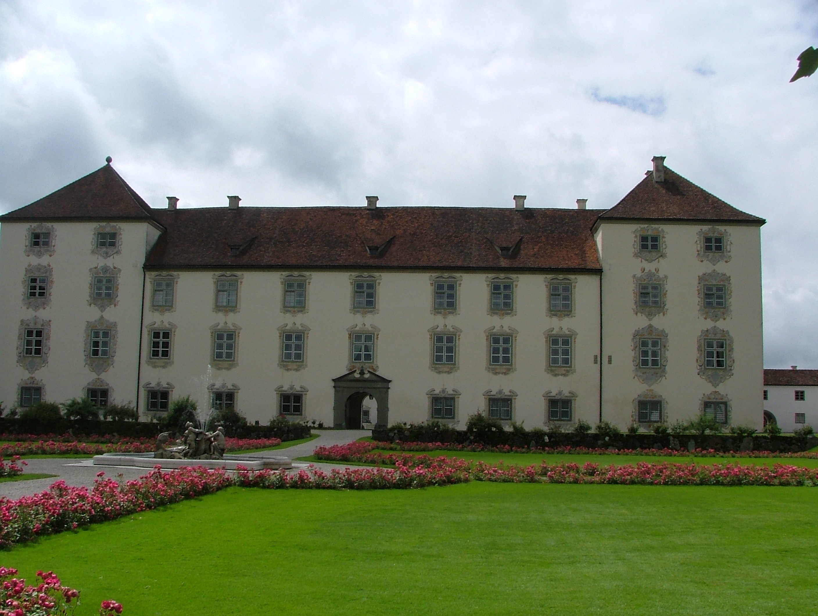 Schloss Zeil, Nordfassade